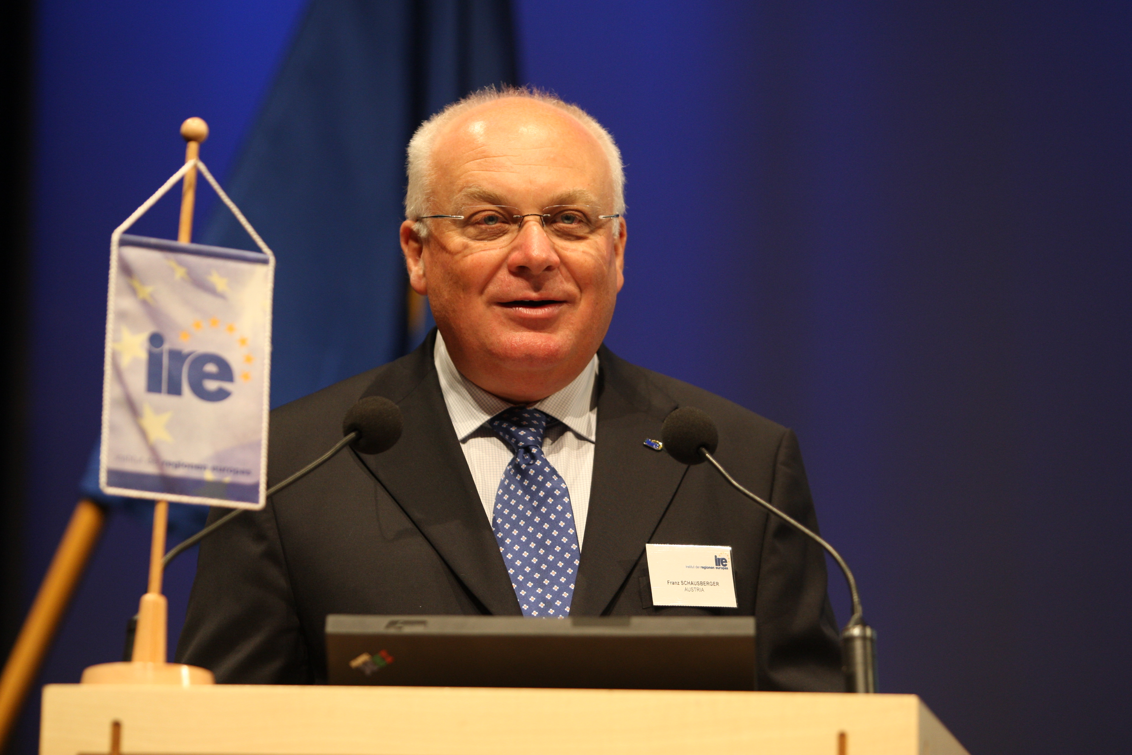 Schausberger Rede 2008